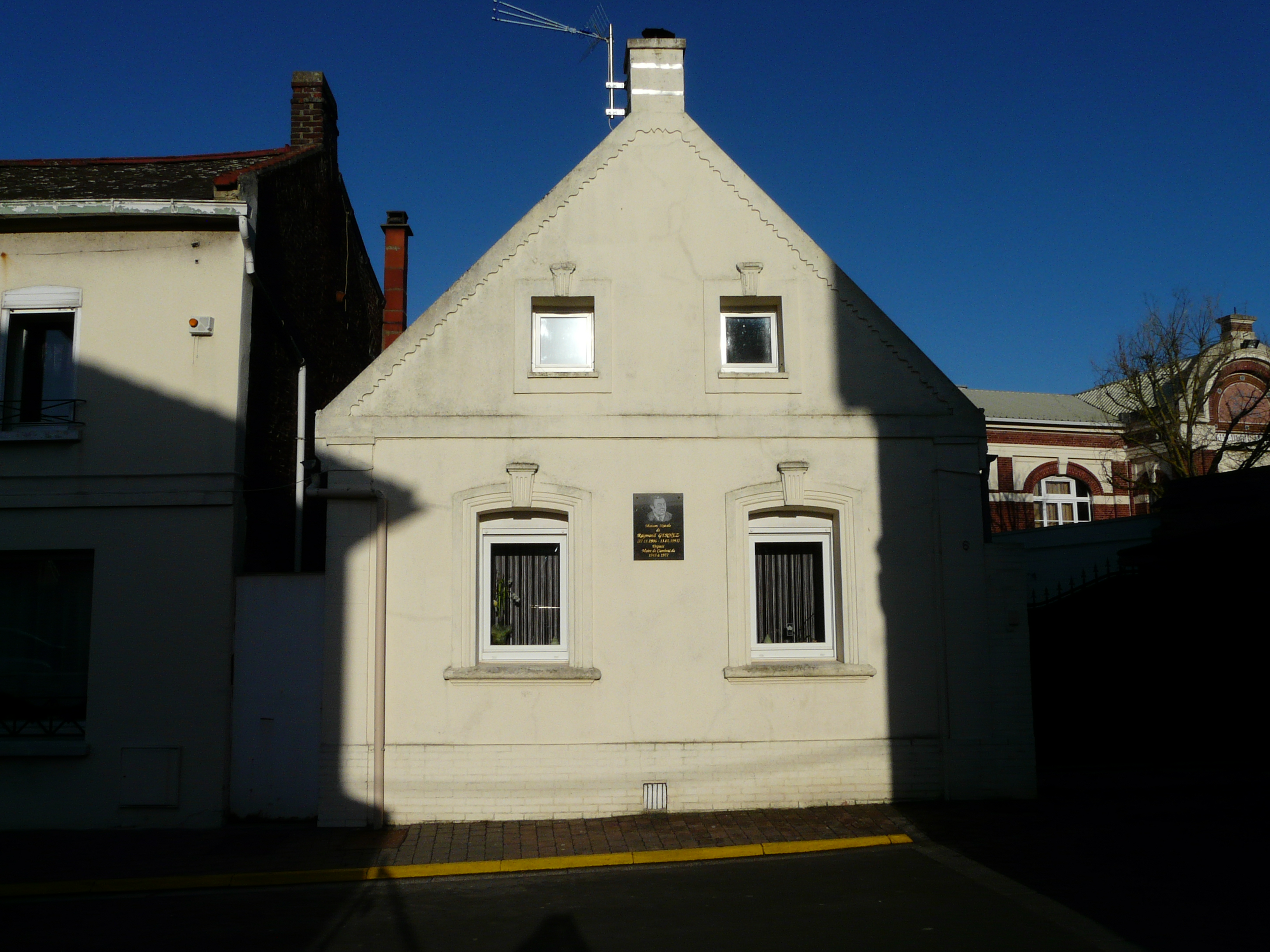 La maison natale de Raymond Gernez, député-maire de Cambrai, à Avesnes-les-Aubert